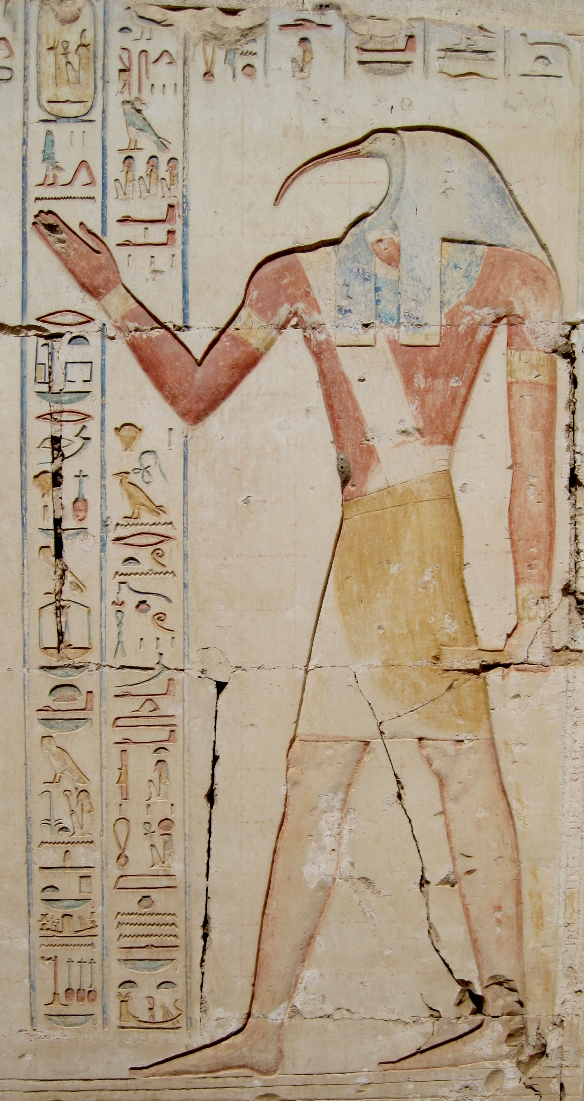 Relief im Tempel Ramses II. in Abydos, Ägypten